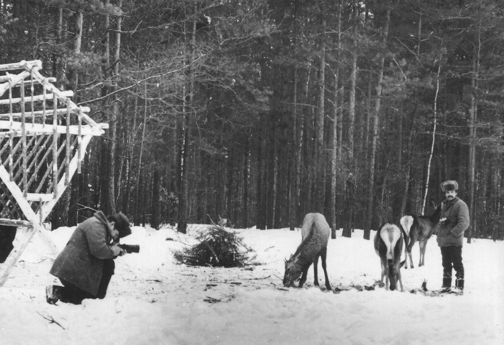 Заснування ЗМЗ Сестробиль